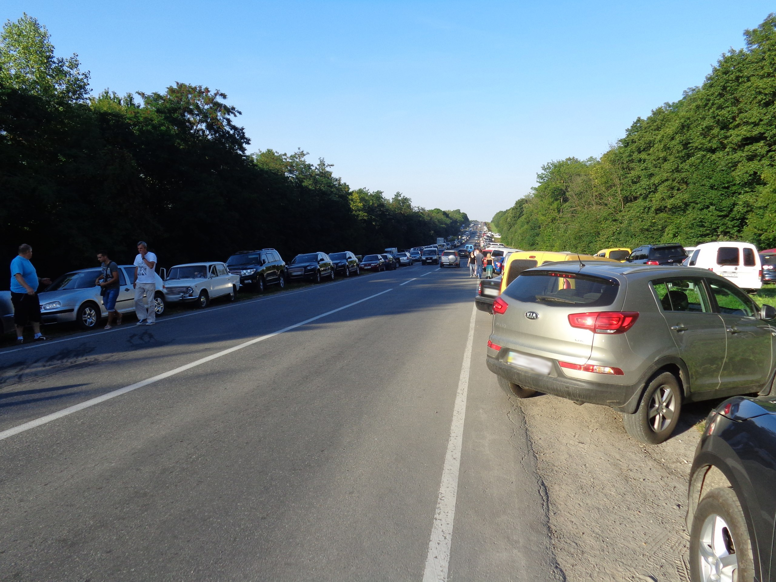 Автомобілі водіїв, які приїхали на фестиваль "Дзвони Лемківщини".